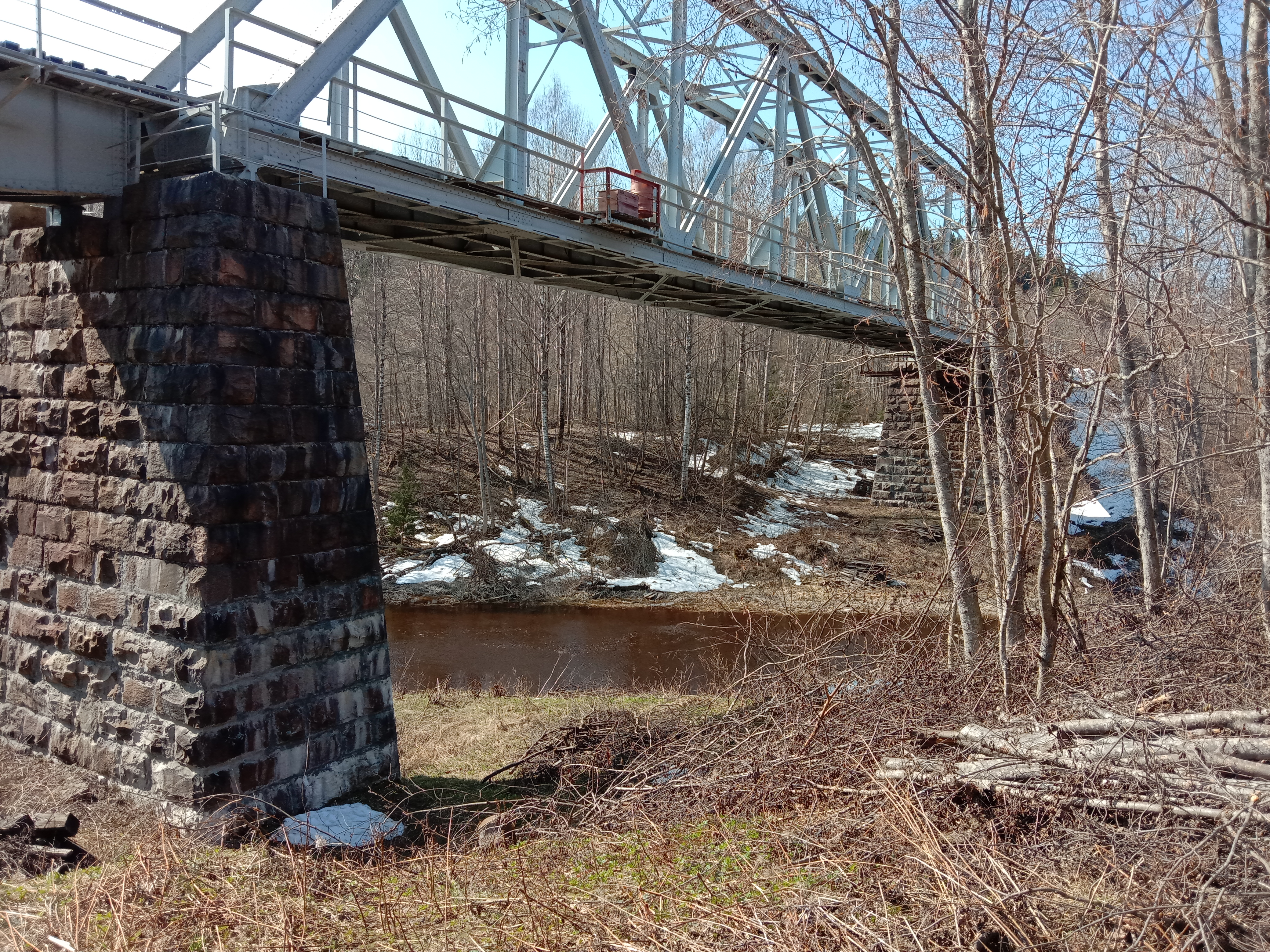 Железнодорожный мост